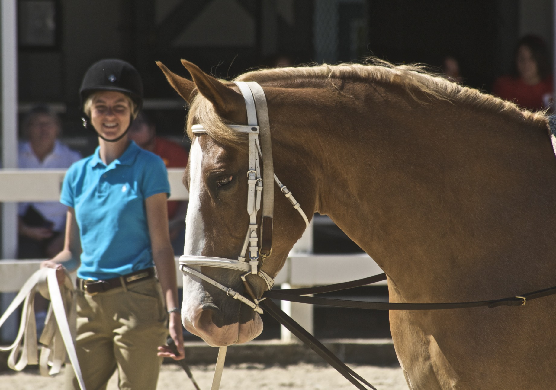 Belgian Warmblood